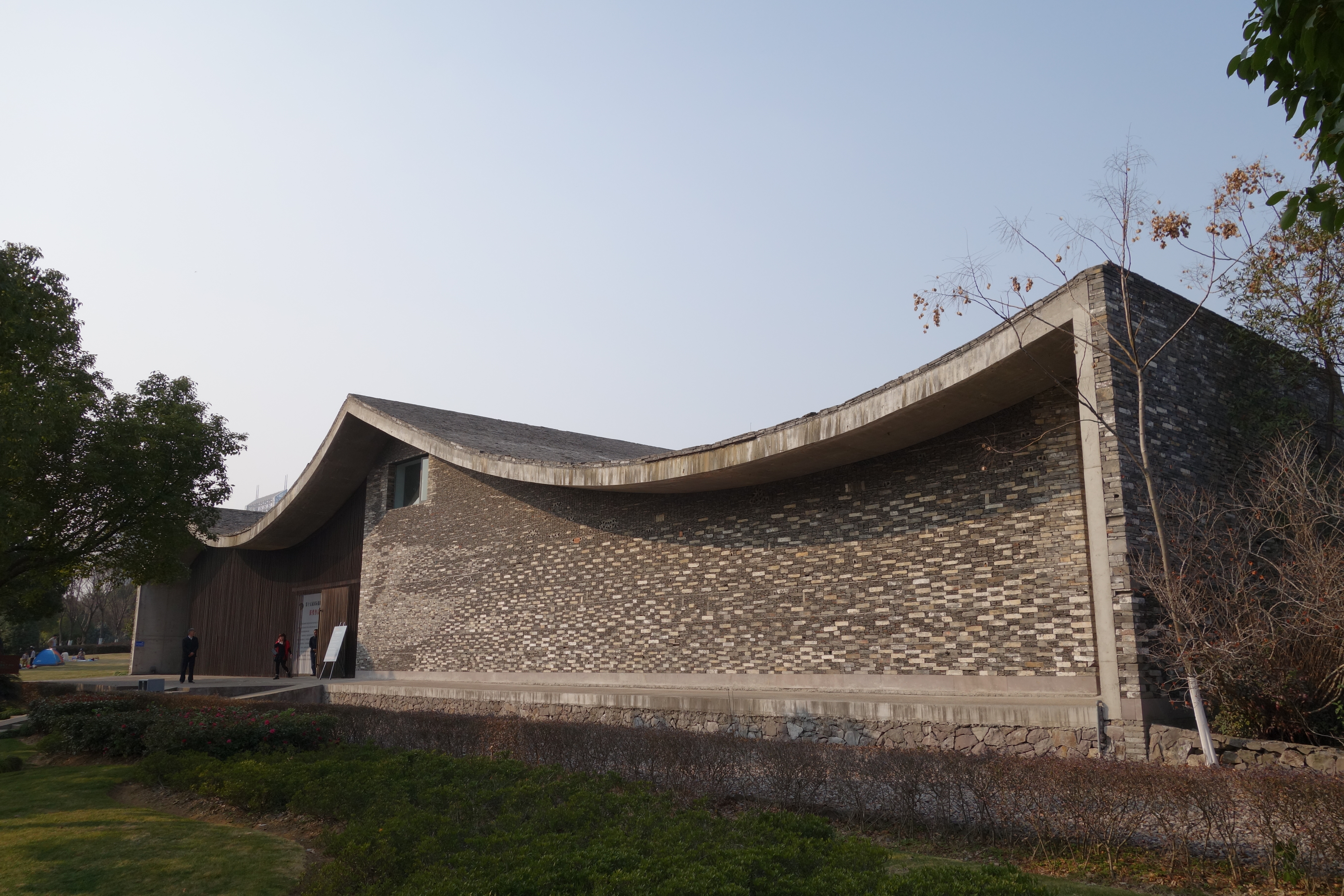 宁波五散房 - 画廊